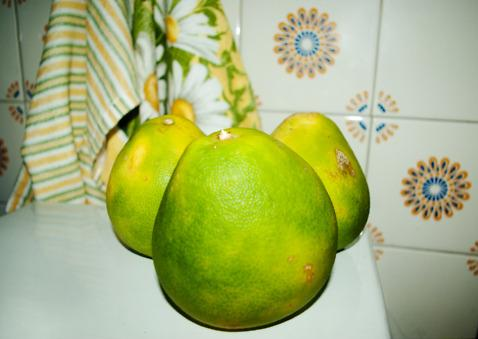 Limonsón es una fruta que parece com una combinación de limón y naranja